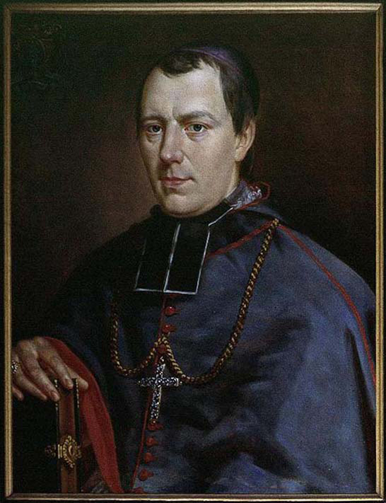 Sint-Baafskathedraal, Gent Portret van Mgr. Ludovicus Josephius Delebecque; inv nr: 499/21